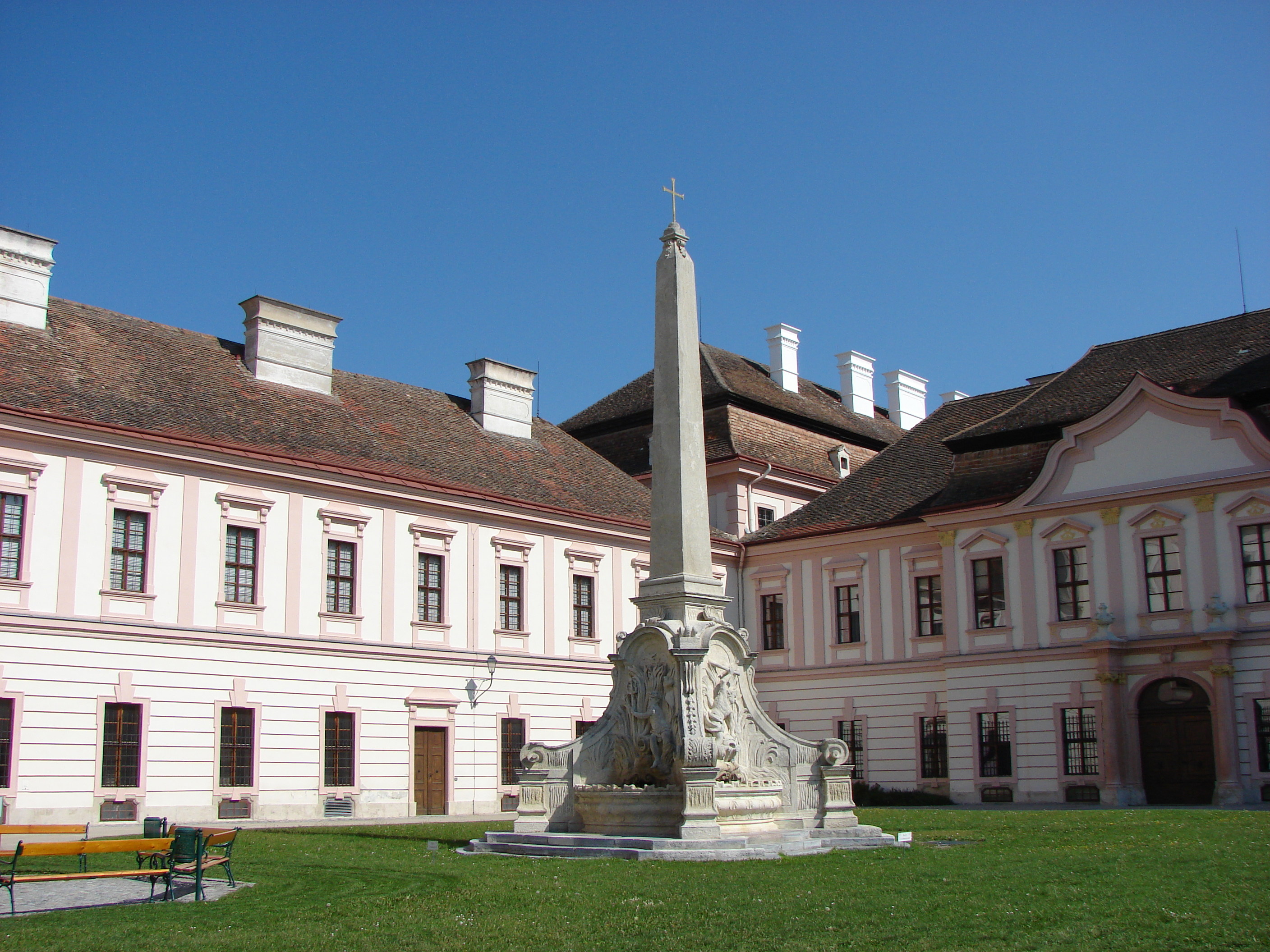 Stift Göttweig, Österreich. Innenhof.